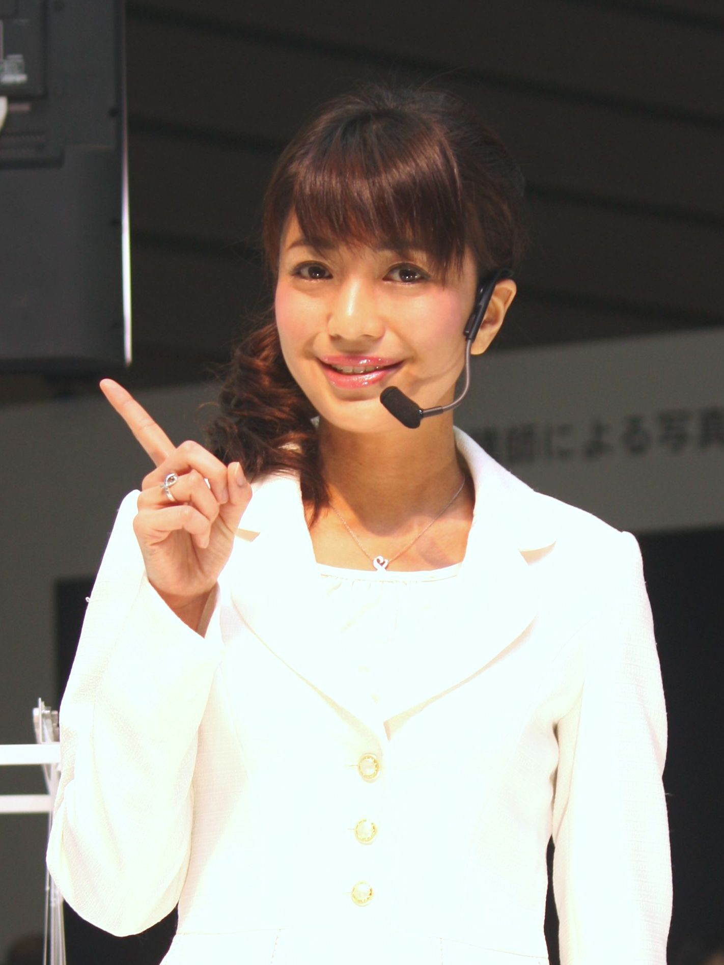 CP+ 2016 Panasonic booth